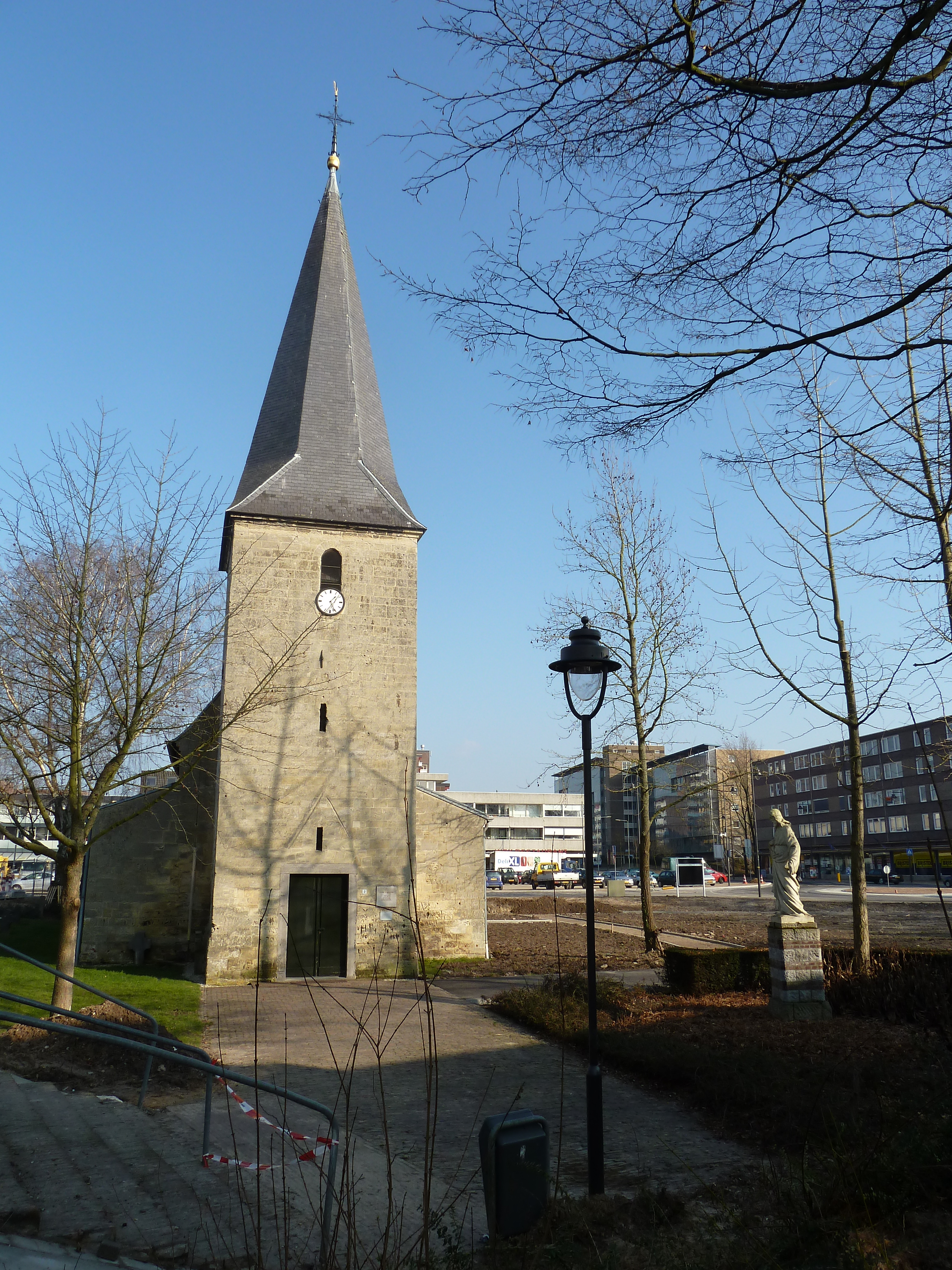 Heilig Hartbeeld naast Sint-Janskerk, Hoensbroek, Heerlen, Limburg, Nederland